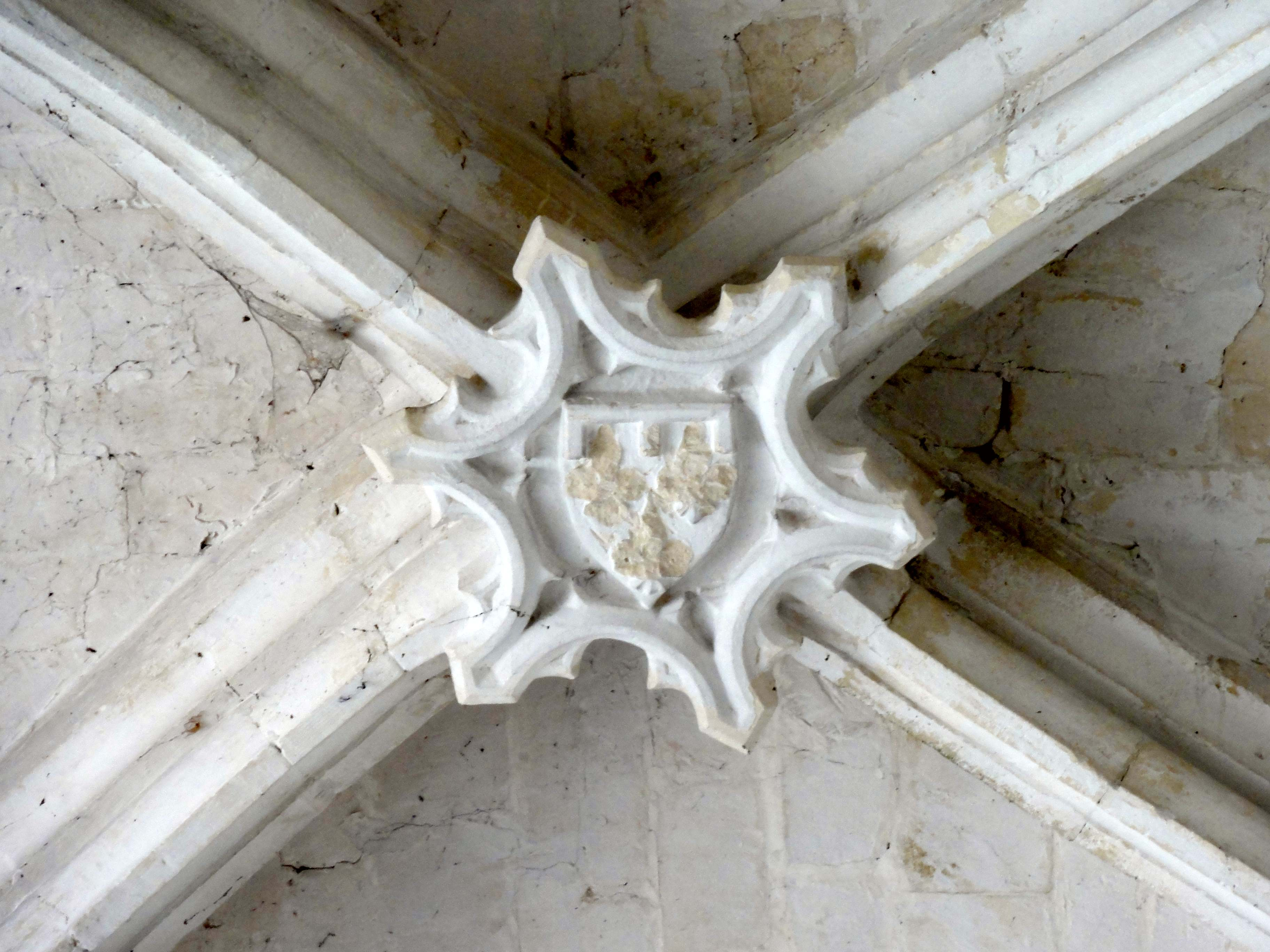 Clé de voûte - voir titre.